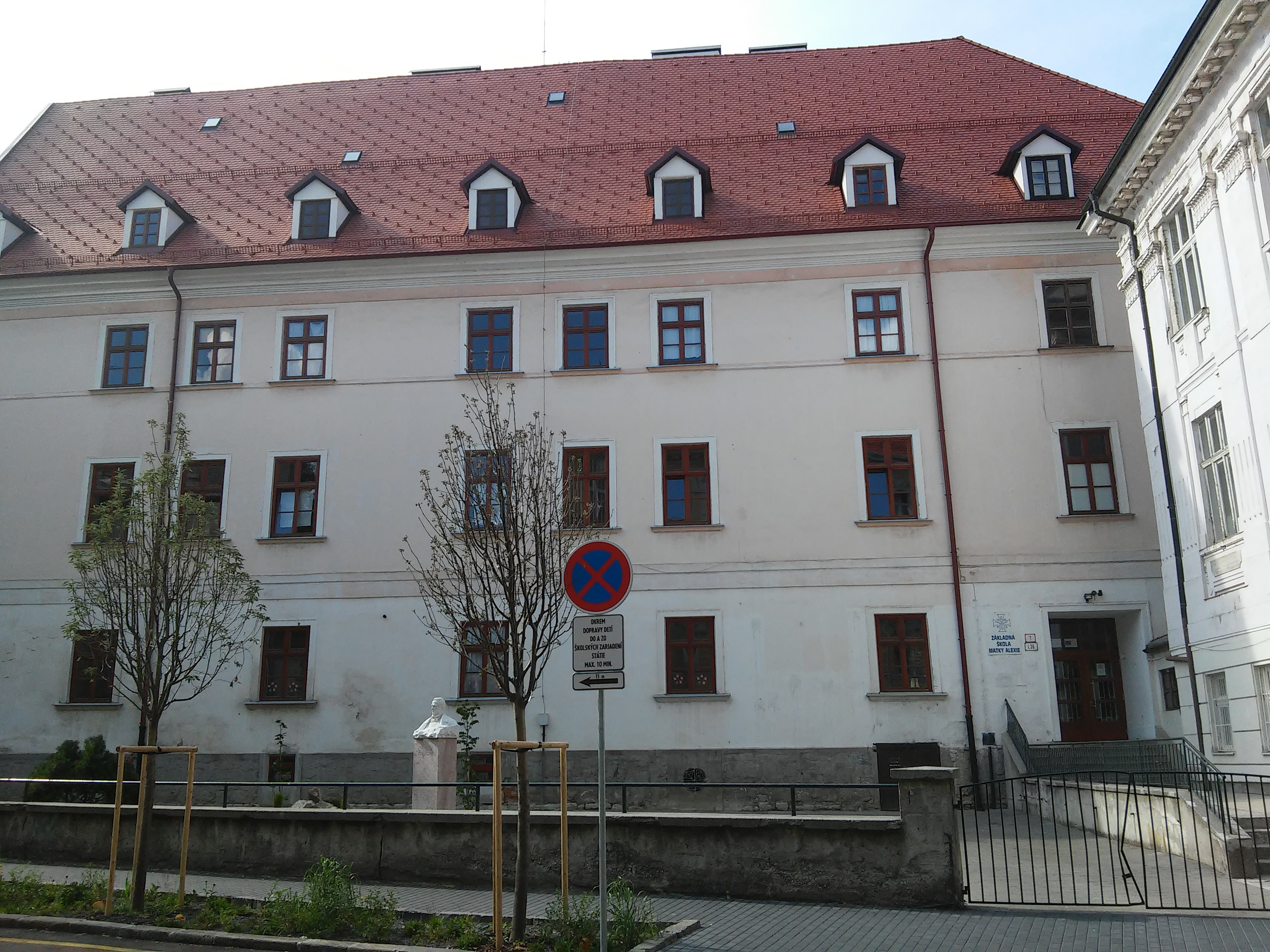 Palackého 1, Staré Mesto, Bratislava